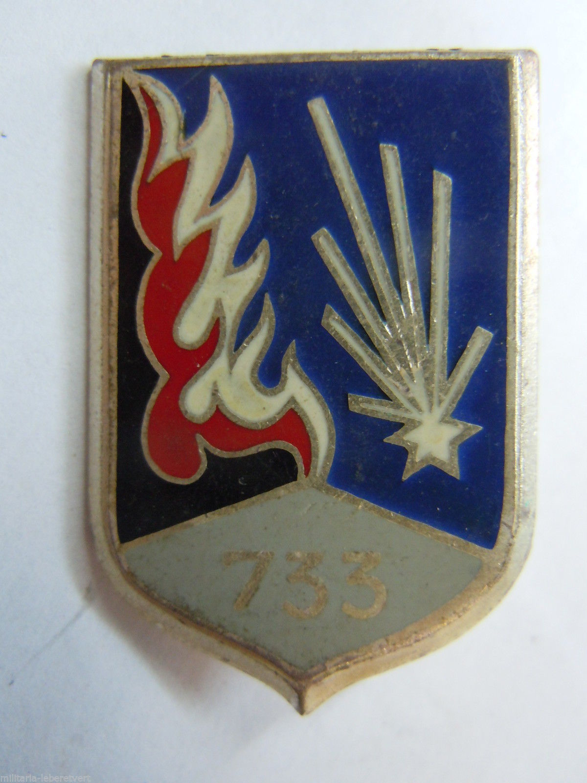 Insigne de la 733e Cie Munitions.